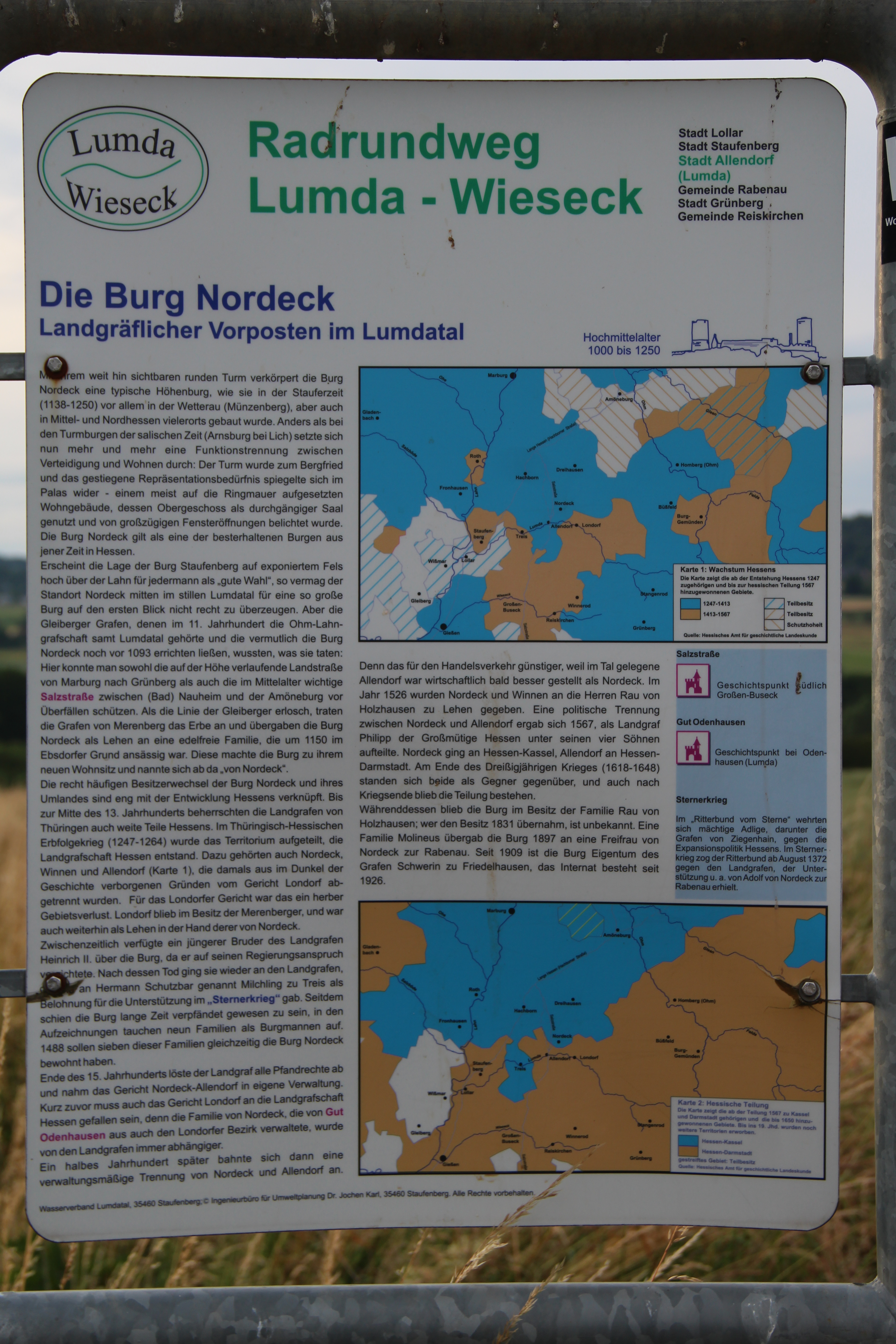 Hinweistafel zur Burg vom Radrundweg Lumda - Wieseck